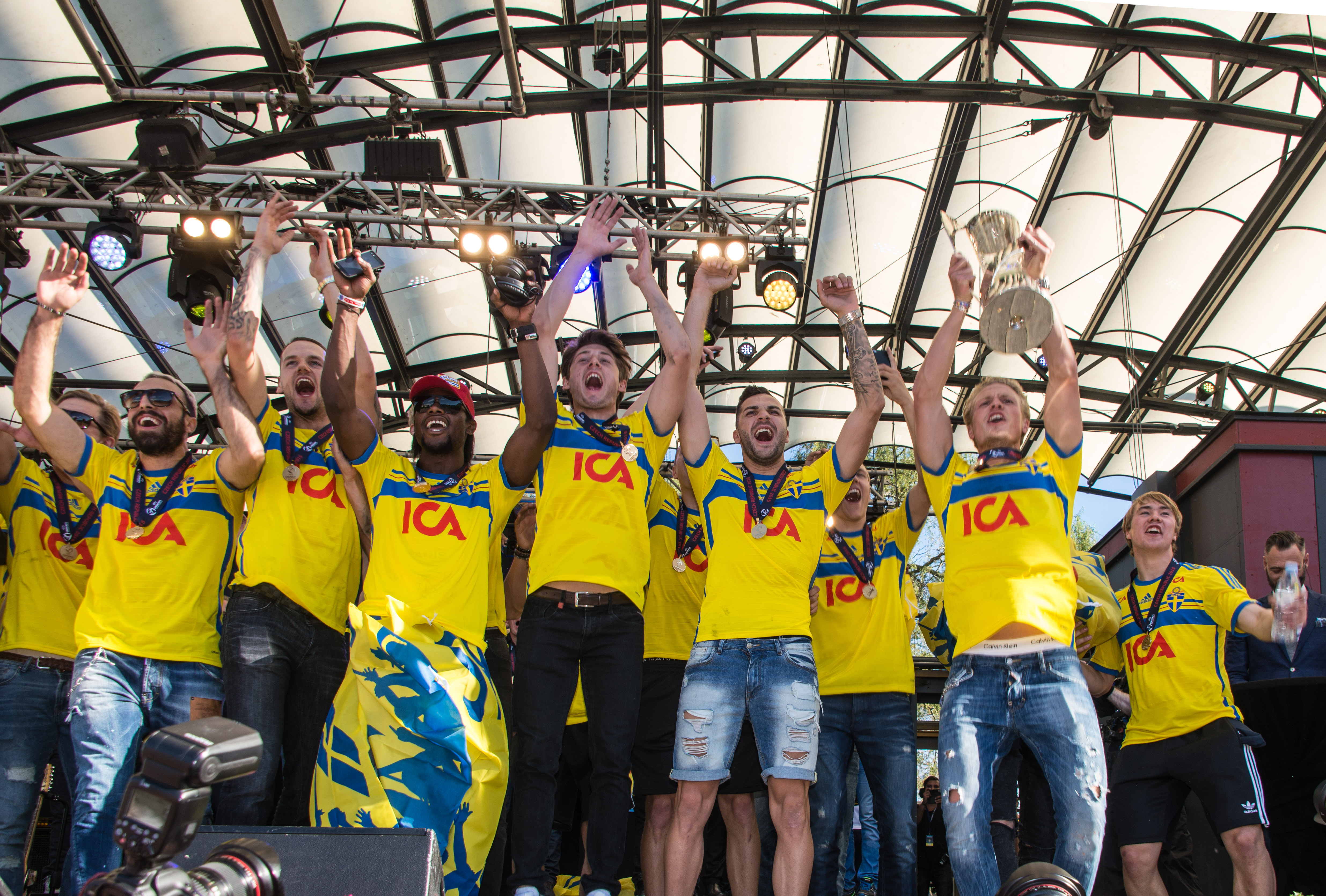 Sveriges U21-landslag blir firad i Kungsträdgården i Stockholm den 1 juli av 1000-tals fans efter guldet i U21-Europamästerskapet i fotboll 2015.